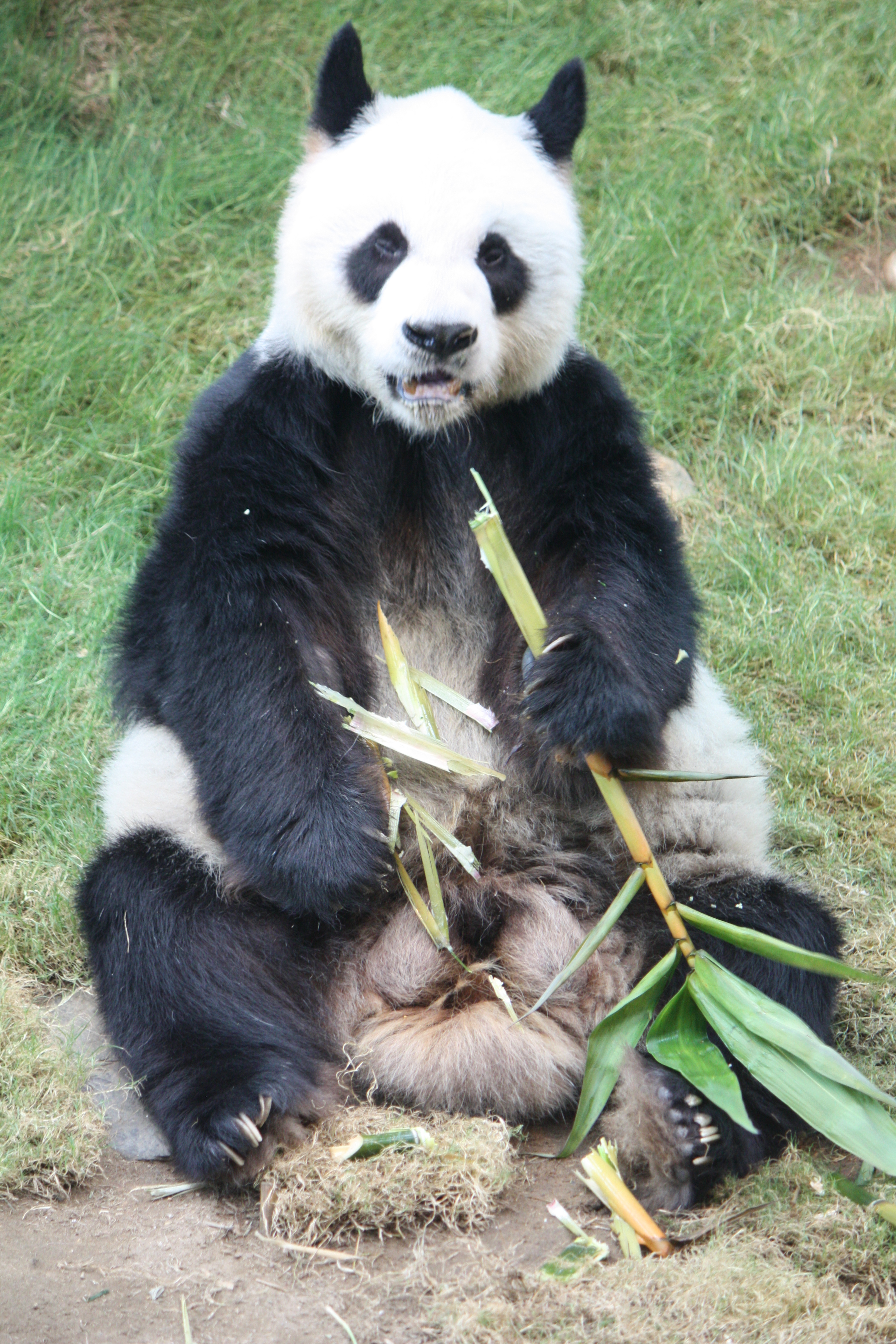 Großer Panda im Ocean Park, Hongkong